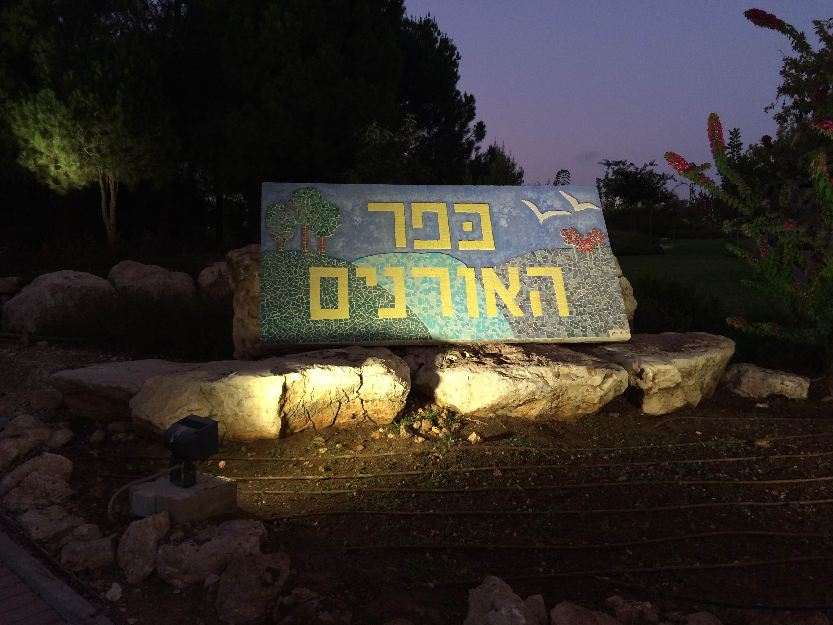 הכניסה ליישוב